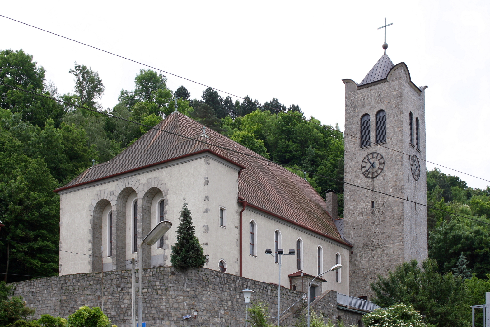 Die Pfarrkirche Greifenstein/Altenberg in der niederösterreichischen Marktgemeinde St. Andrä-Wördern